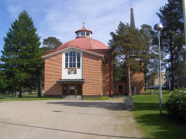 Kajaanin ortodoksisen seurakunnan kirkko